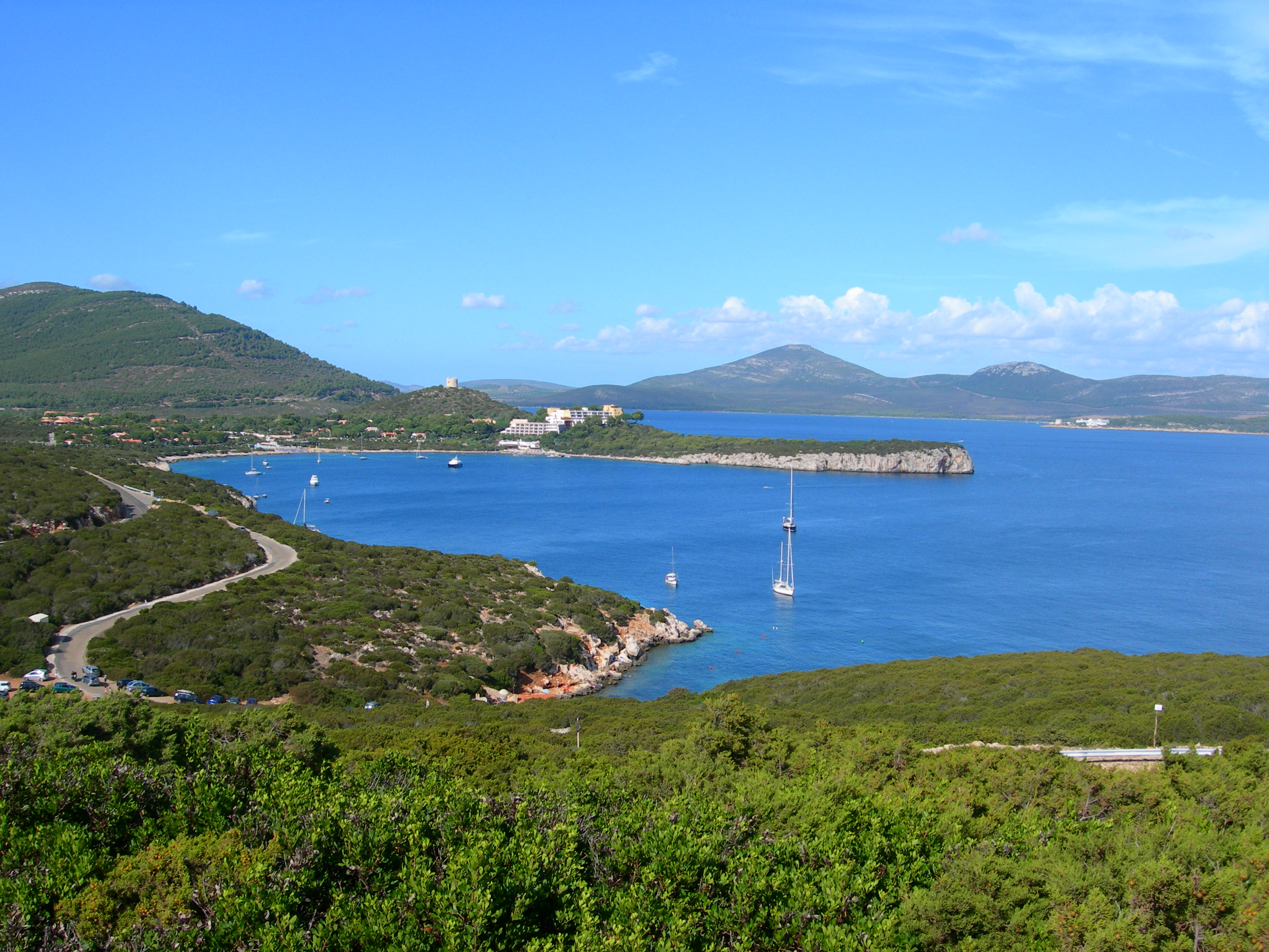 Veduta dell'insenatura Cala della Calcina di fronte all'hotel Capo Caccia, in località Pischina Salida, località a pochi km da Alghero, Sardegna, Italia